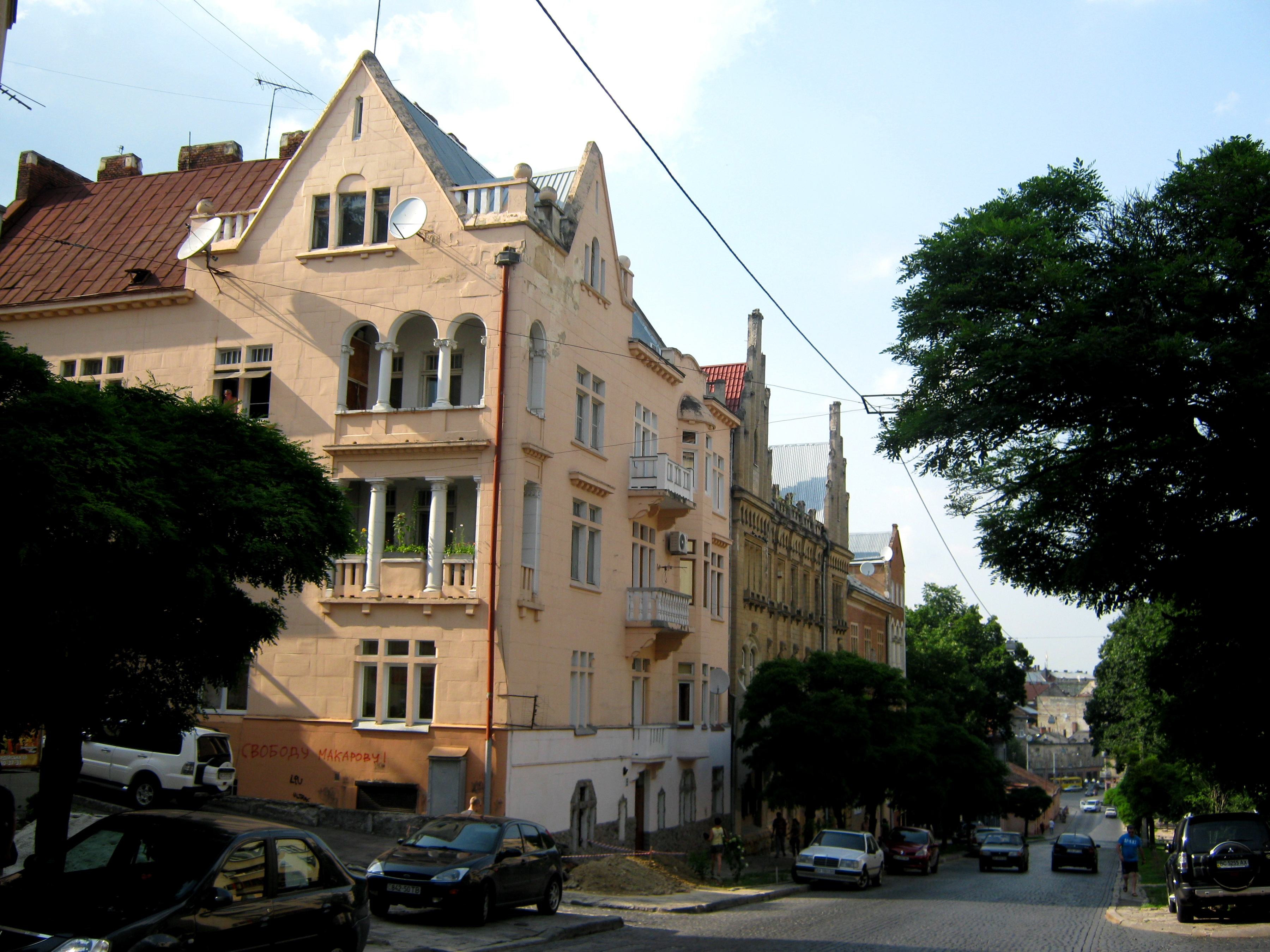 Прибутковий будинок Збігнєва Левинського, арх. З. Левинський, 1906-1907 рр. Львів, Героїв Майдану, 8